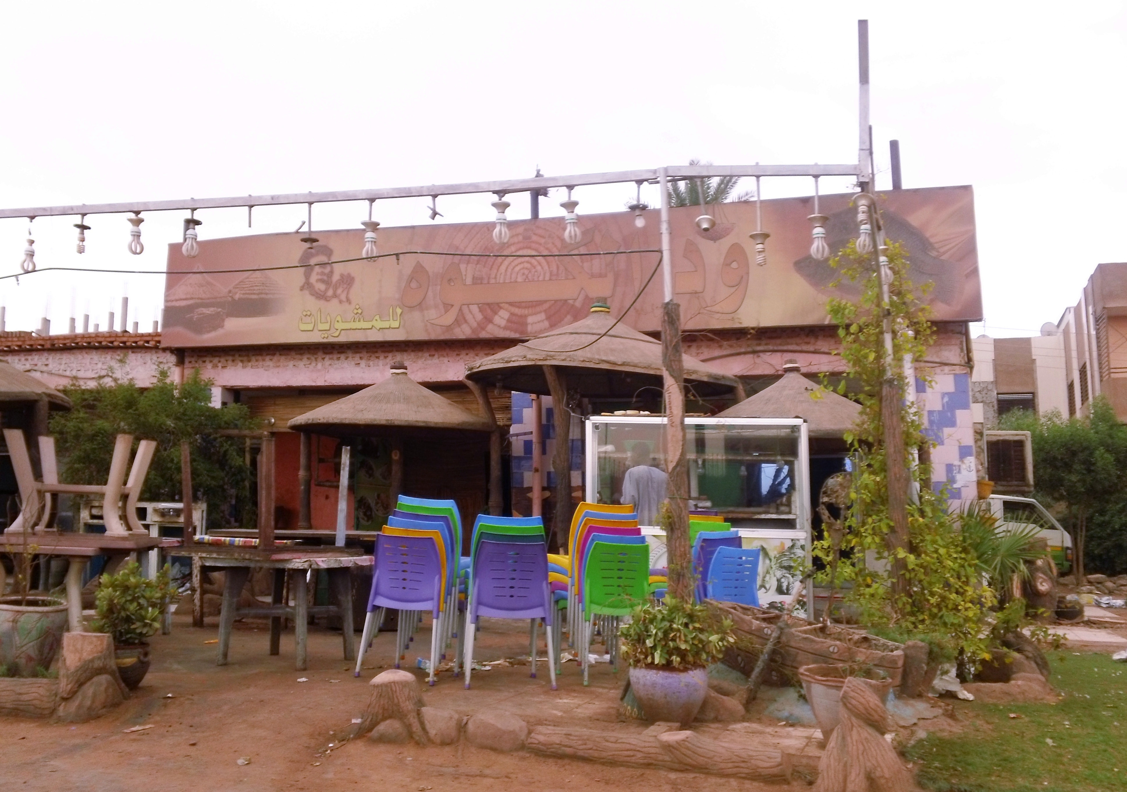 Almorada Grills - Almorada Road - Omdurman - Sudan